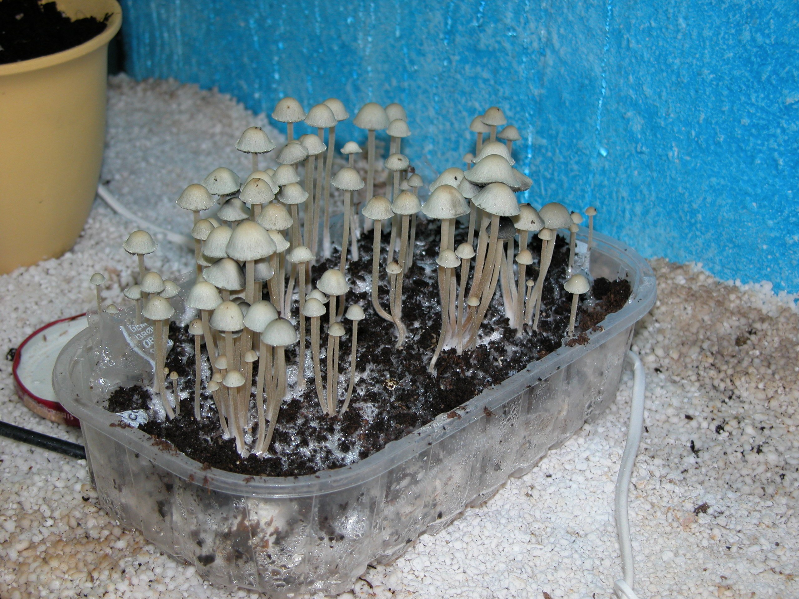 Panaeolus cyanescens